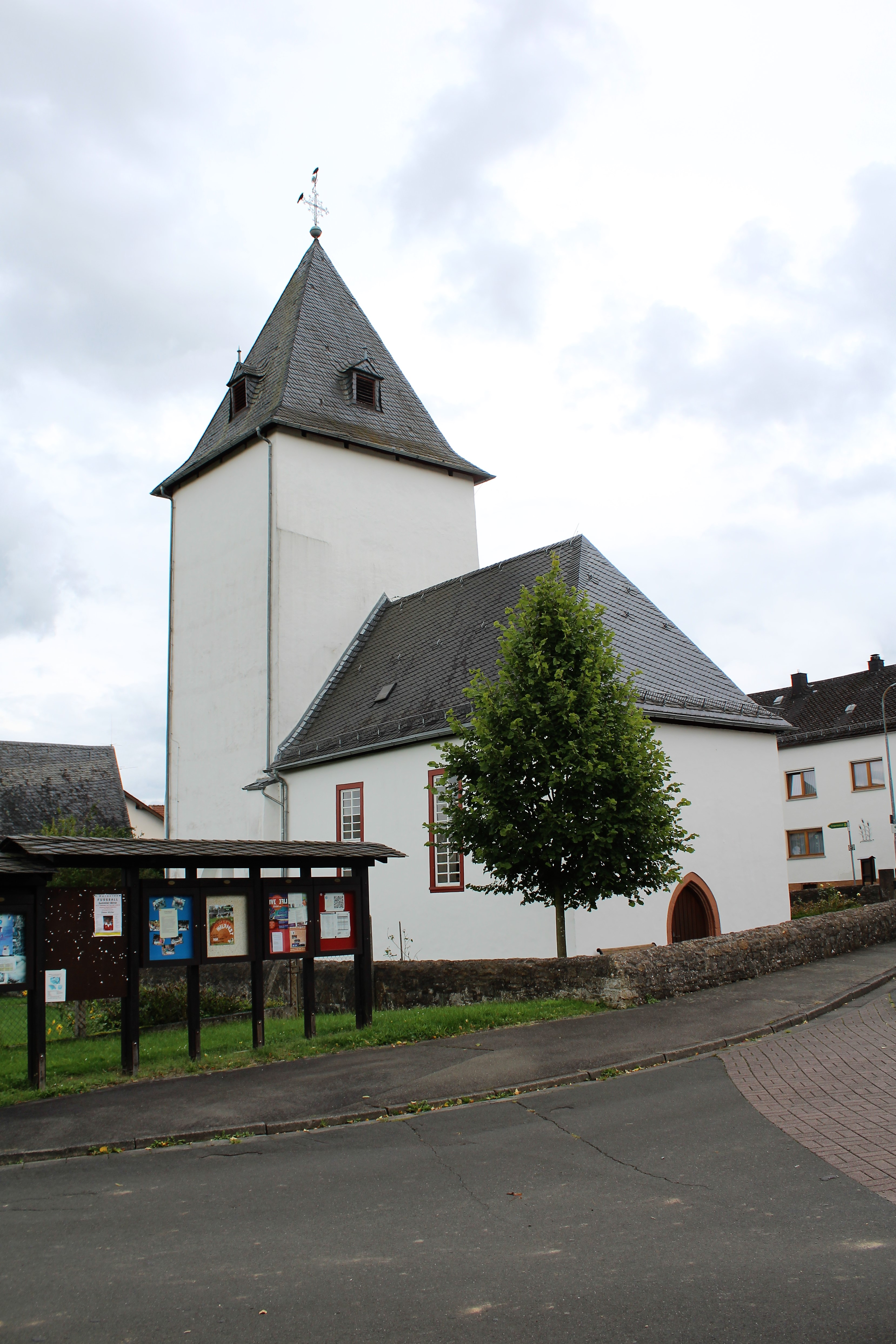 Evangelische Kirche Daubhausen, Lahn-Dill-Kreis, Hessen, Deutschland